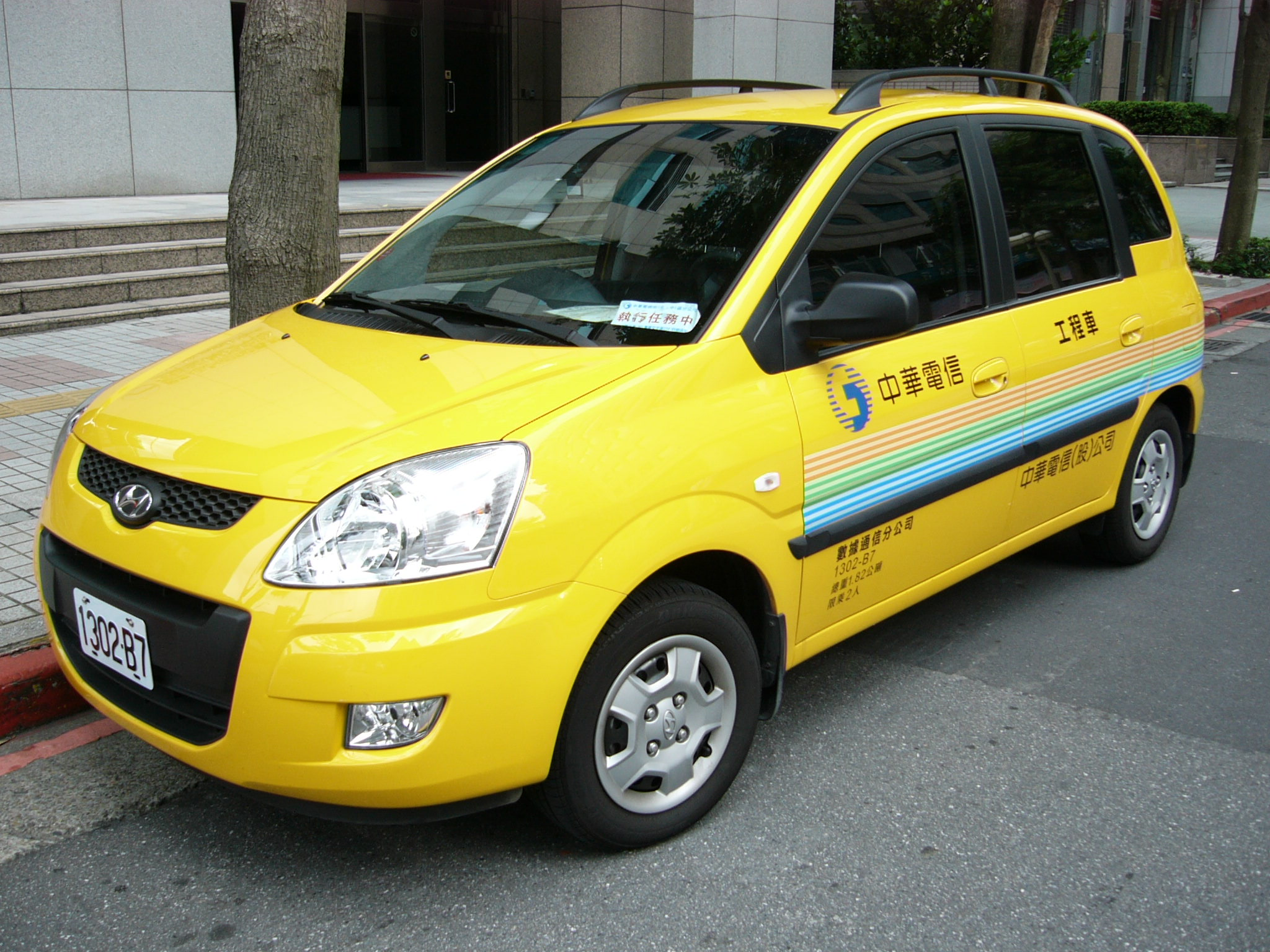 中華電信數據通信分公司工程車1302-B7左前方外觀，車型為Hyundai Lavita，外觀為中華電信第二代企業識別系統塗裝